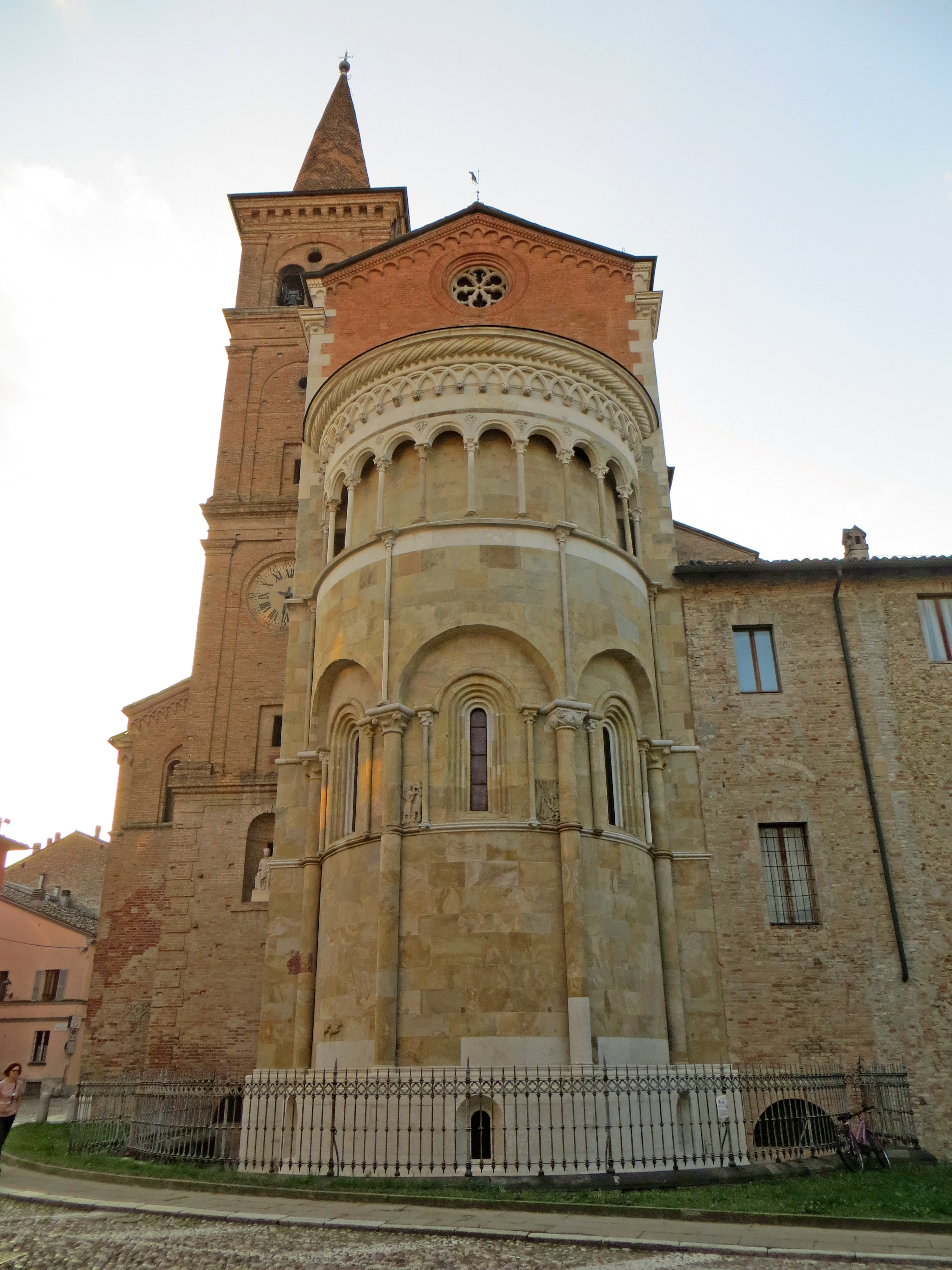 Duomo (Fidenza) - abside